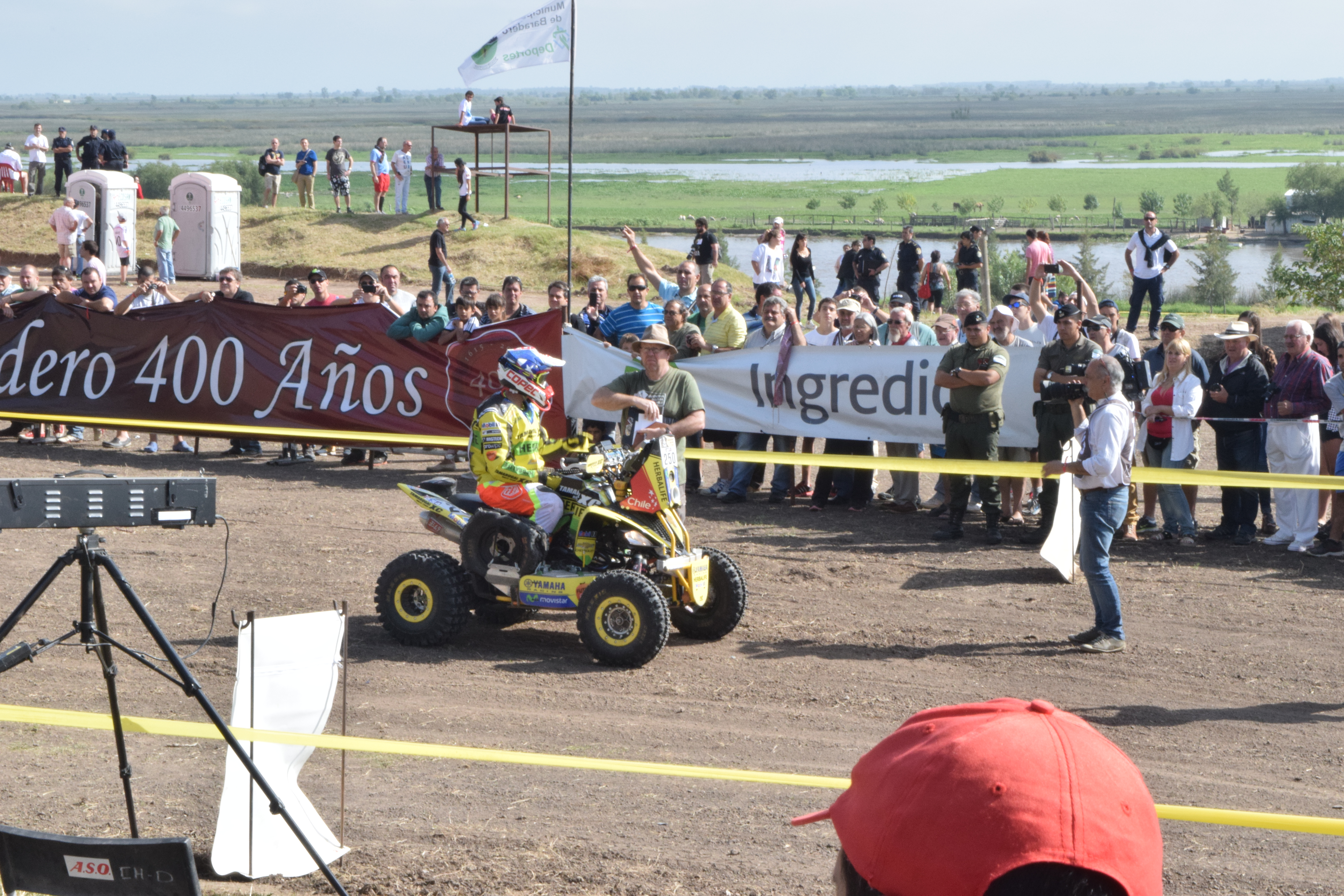 Largada de la primera etapa del Rally Dakar 2015 en la ciudad de Baradero.